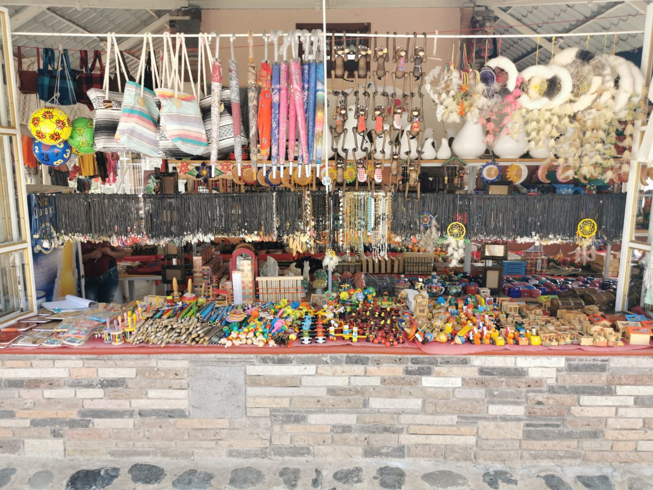 Una de las muchas tiendas de recuerdos típicos de la región de Huasca de Ocampo. Ubicada en la zona turística de los Prismas Basálticos.